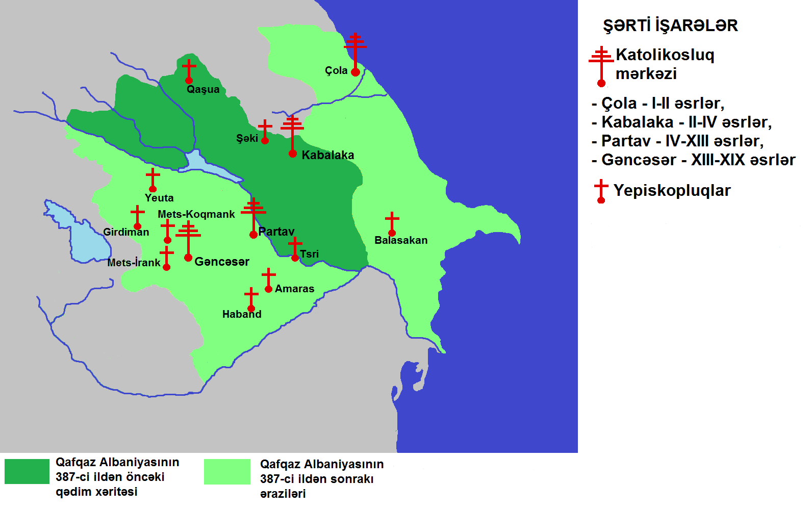 Alban Həvari Kilsəsinin mərkəzləri və yepiskopluqları (Епископства и католикоства Кавказской Албании) Mənbələr: Robert H. Hewsen, Armenia: A Historical Atlas. The University of Chicago Press, 2001. Себеос - История императора Иракла, XXVIII, XXIX